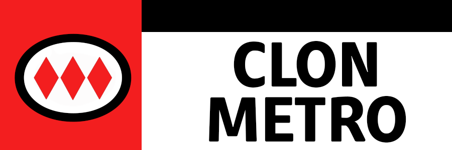 Señal bus clon metro transantiago (recreacion)